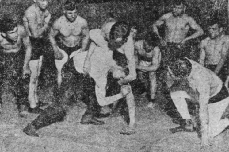 ハルハウスの体育クラブ 小学校長団の観たる米国の教育 -東京市教育会 編 (佐藤出版部, 1920)